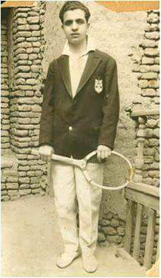 الدكتور الجراح سلمان فائق آل شاكر عندما كان طالبا في الكلية الطبية الملكية العراقية وهو في سطح دار جاره في محلة البارودية في بغداد، 1932